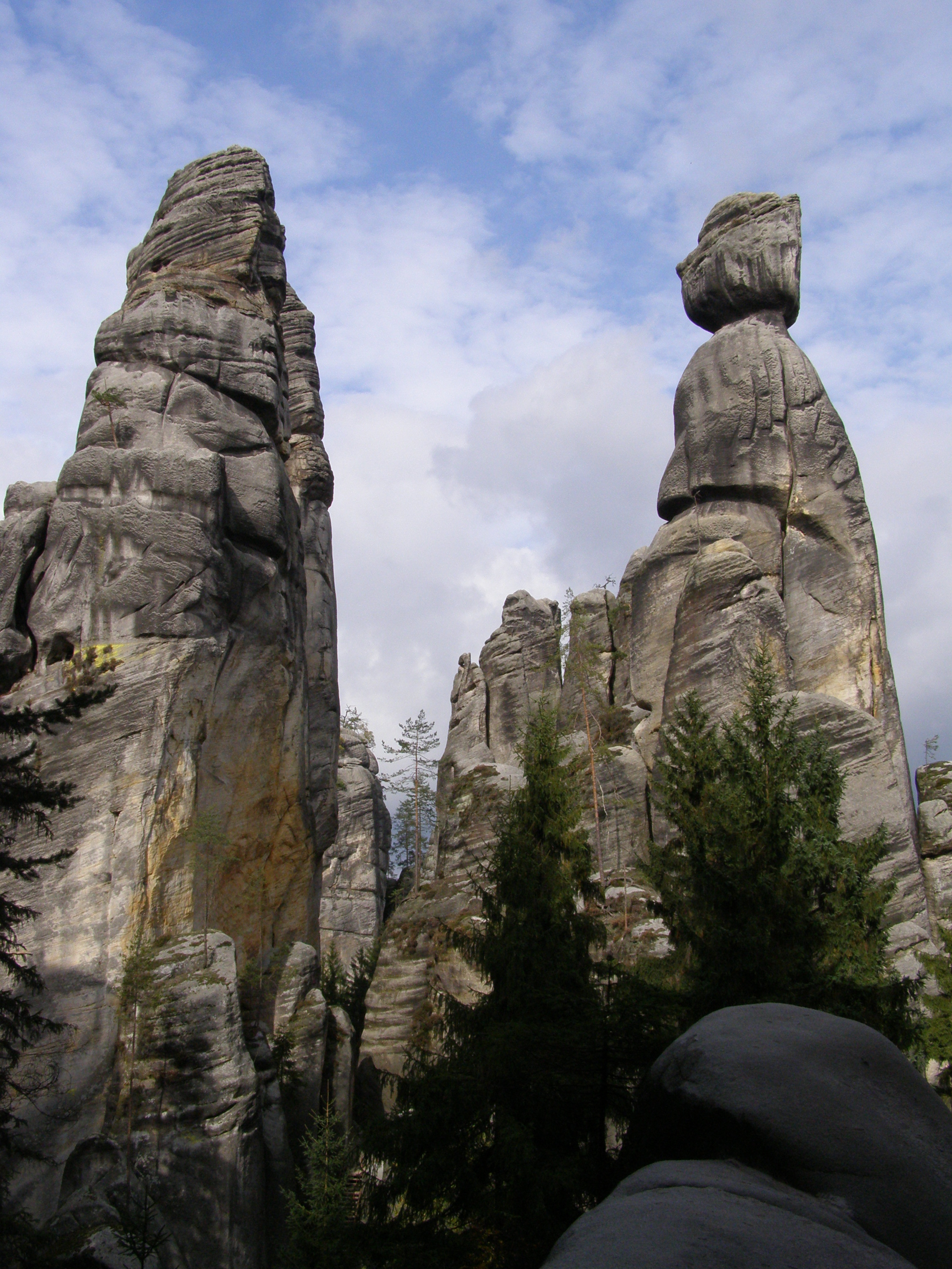 Adršpašské skály